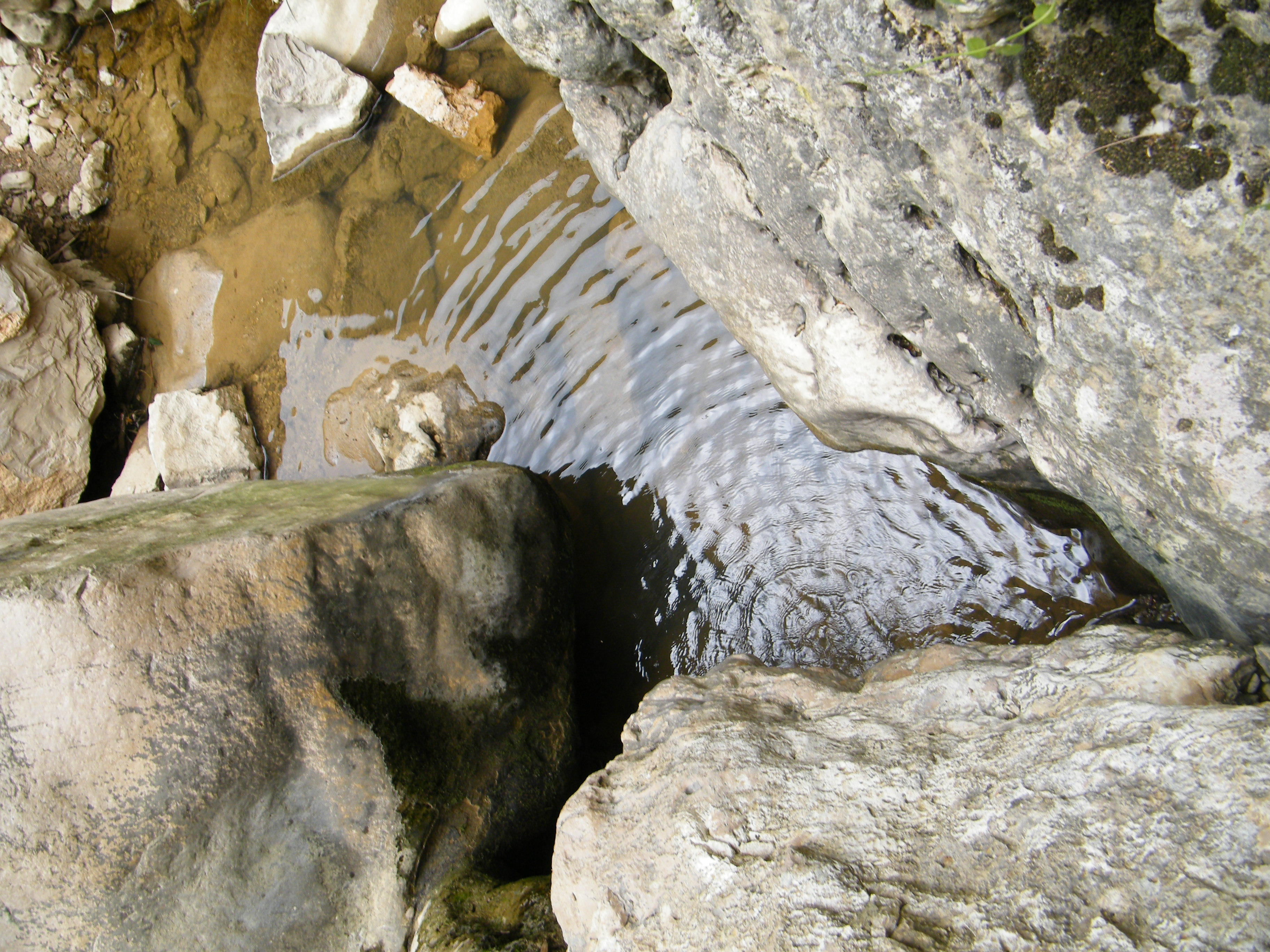 תמונה צולמה באחד הקטעים הסלעיים לאורכו של נחל חזורי, ממזרח למבצר נמרוד בצפון הגולן. הקטע היה מוצל דיו כדי להבחין בהיווצרות יפיפיה של חזיתות גל מעגליות כמעט מושלמות, ורואים זאת בתמונה בצורה טובה. החסרון בה הוא שלא רואים את הפער הקטן בסלע, ואת הגל המגיע אליו, מאחר ואלה היו מוסתרים, והדרך היחידה להגיע למשהו היתה דרך המים, מה שהיה מפריע כמובן לתהליך ההיווצרות עצמו